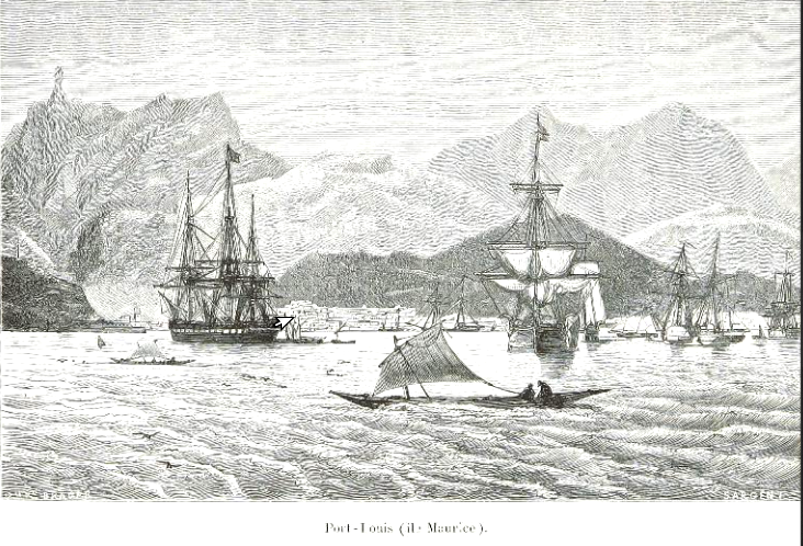 Arthur Mangin, Voyages et Découvertes outre-mer au XIXe siècle, illustrations par Durand-Brager, 1863 ː Port-Louis.